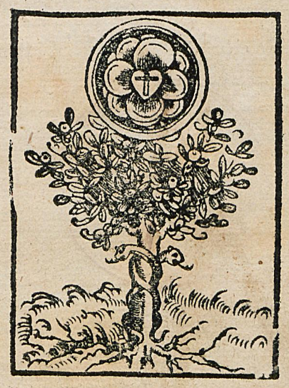 Druckermarke von Joseph Klug, scan aus: Geistliche Lieder zu Wittemberg 1544, Digitalisat der Staatsbibliothek Berlin